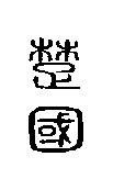 State of Chu (small seal script, 220 a.C.)